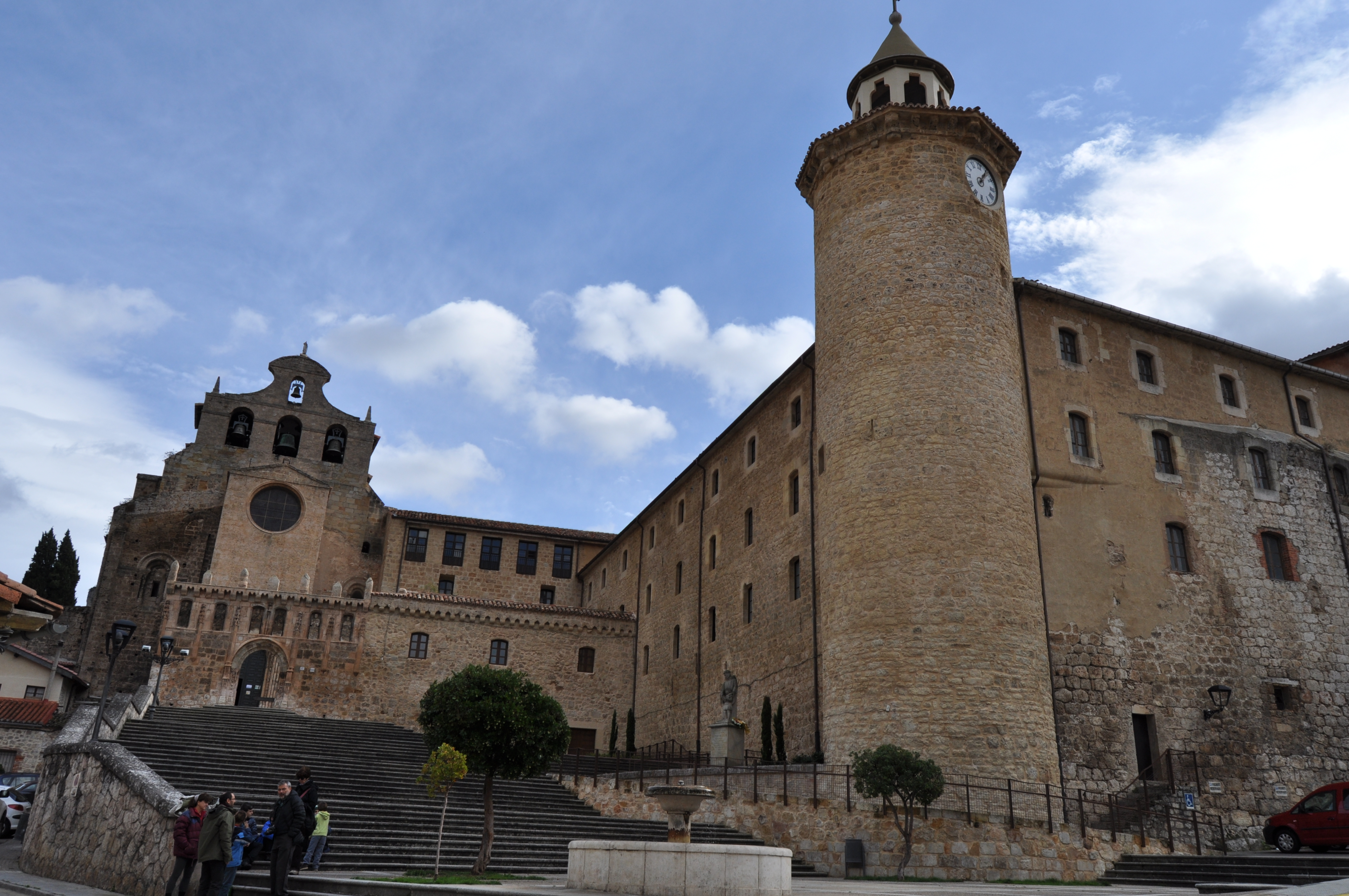 Oña - 012